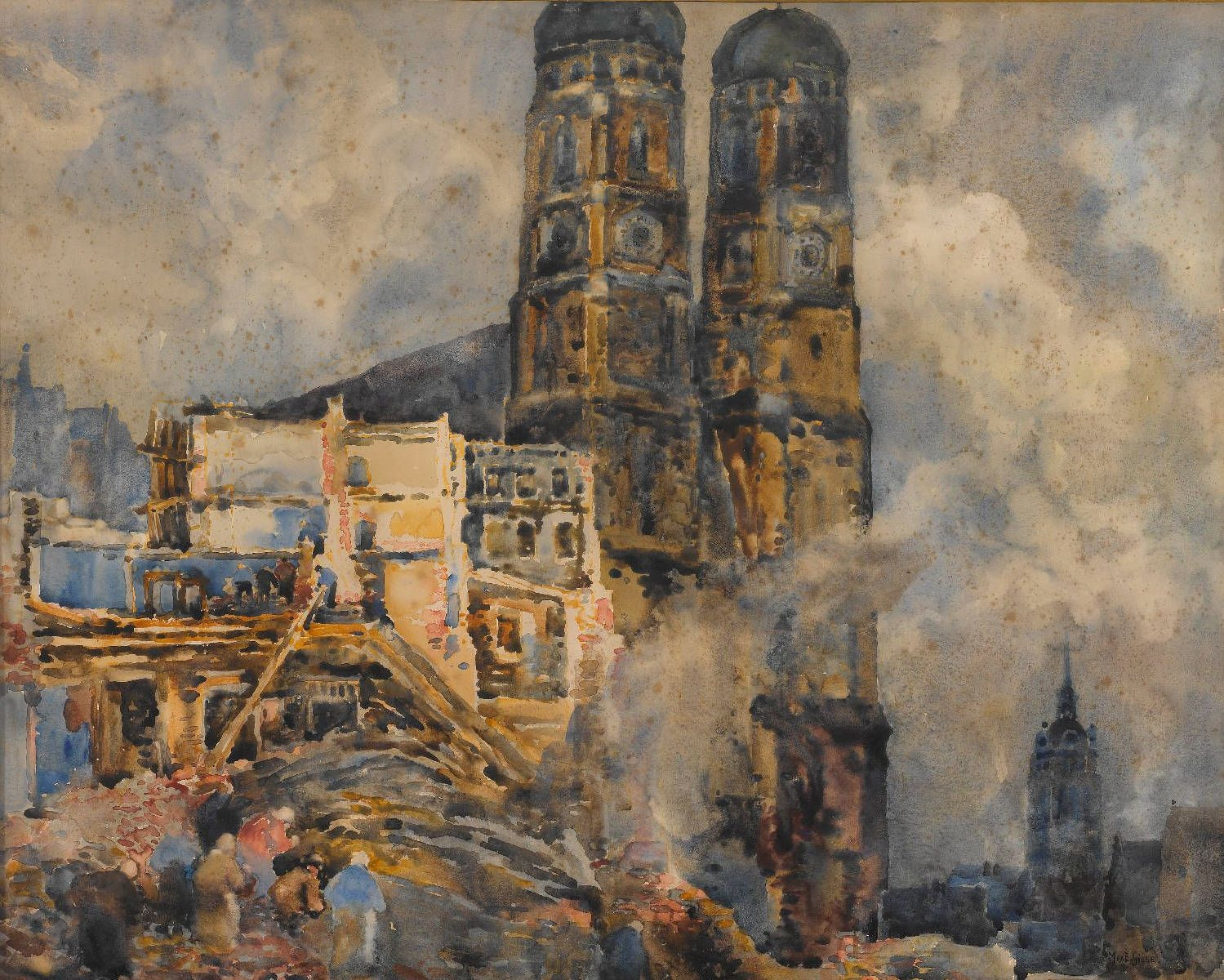 Der Abbruch des Augustinerstocks in München mit Blick auf die Frauenkirche. Signiert. Aquarell. 66 x 83 cm